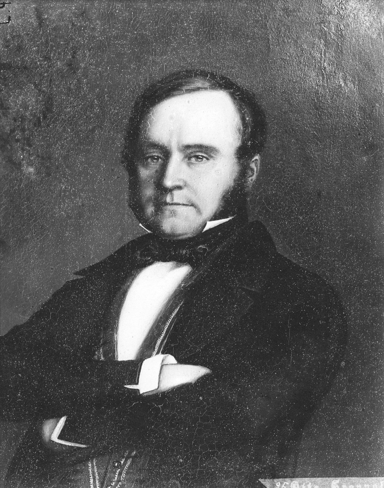 Redaktør, Stortingsmann Herman Bagger. Repro: Norsk Folkemuseum L 408